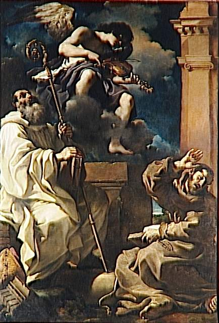 Saint François en extase et Saint Benoit avec un ange musicien, 280x183 cm, Paris, Louvre